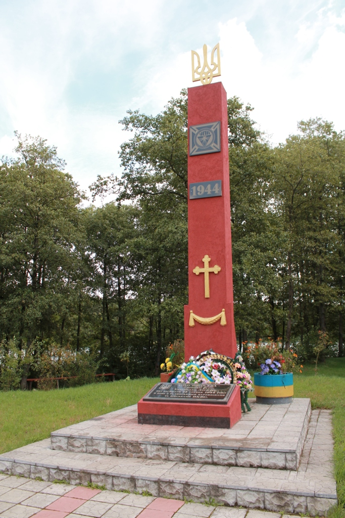 Меморіал воякам УПА, у Стриганах